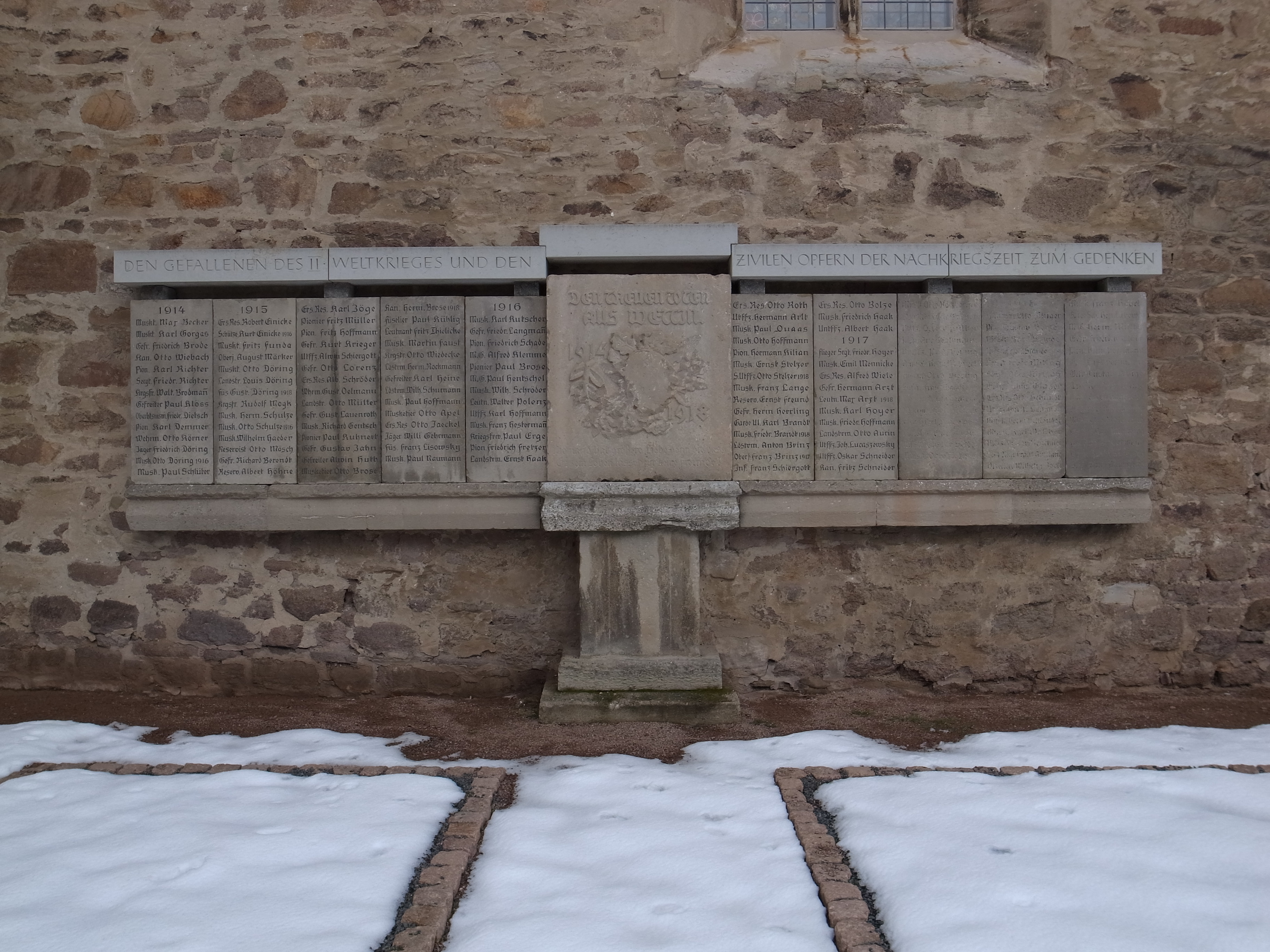 Wettin, Gefallenendenkmal an der Nikolaikirche